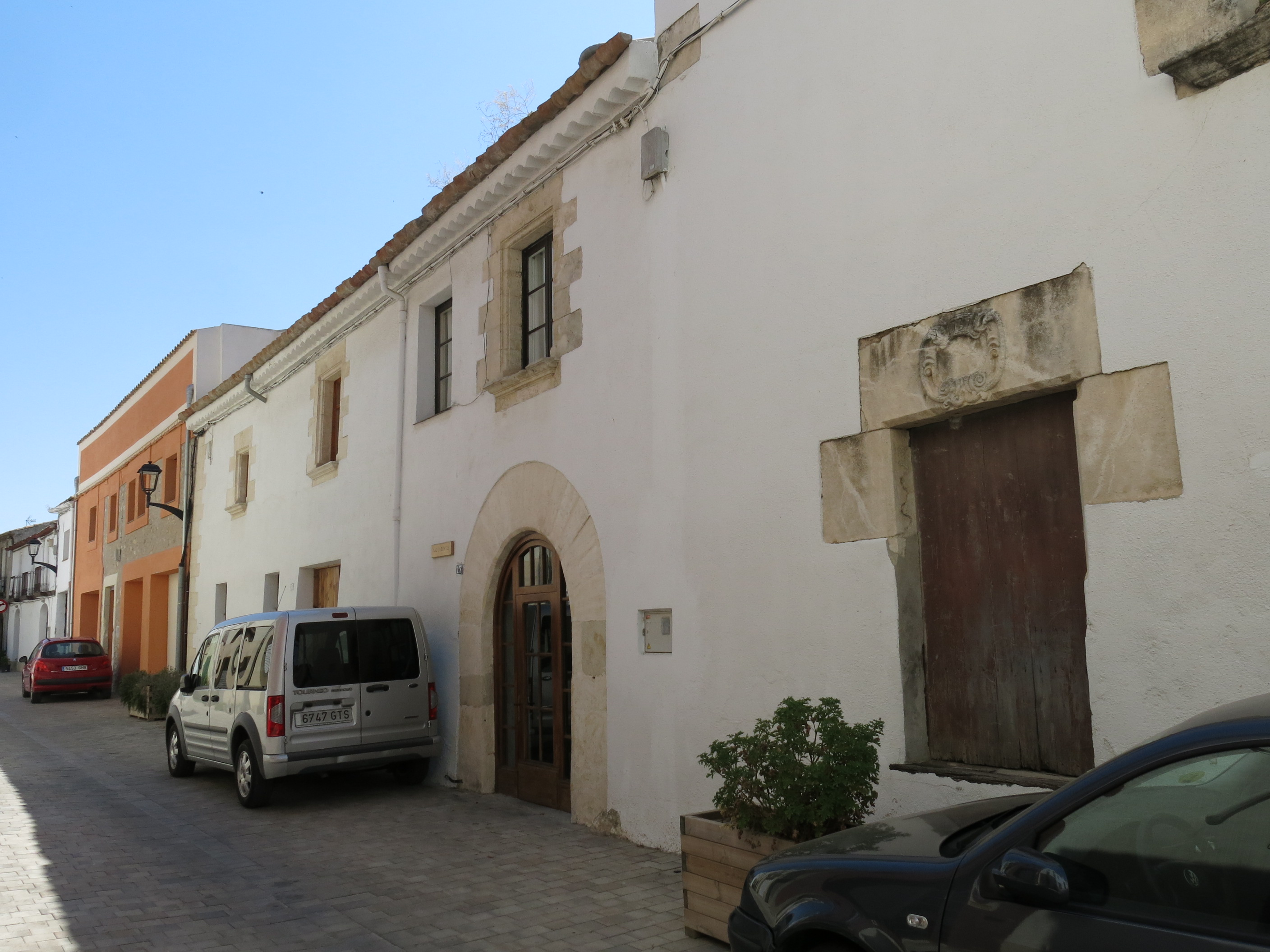 Conjunt del carrer de Baix (la Granada)